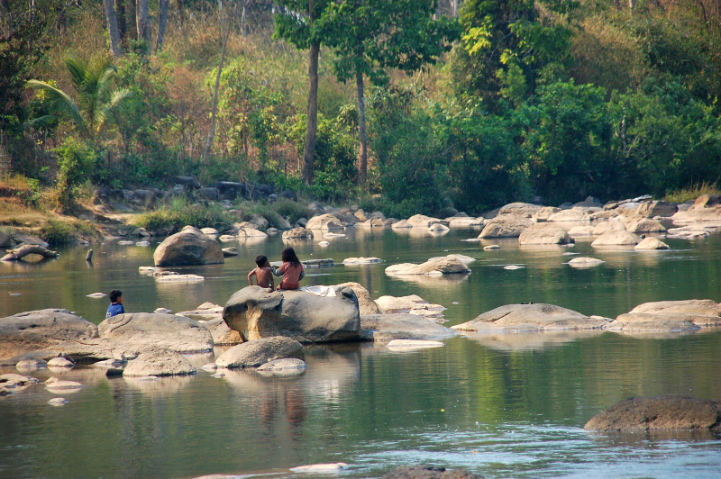 Bolaven Plateau, Tad Lo ,Laos